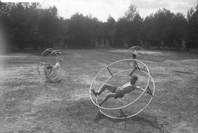 Neue Wege zu Kraft und Schönheit! Studentinnen und Studenten der Deutschen Hochschule für Leibesübungen beim Fahren schwieriger Figuren mit dem Rhönrad.